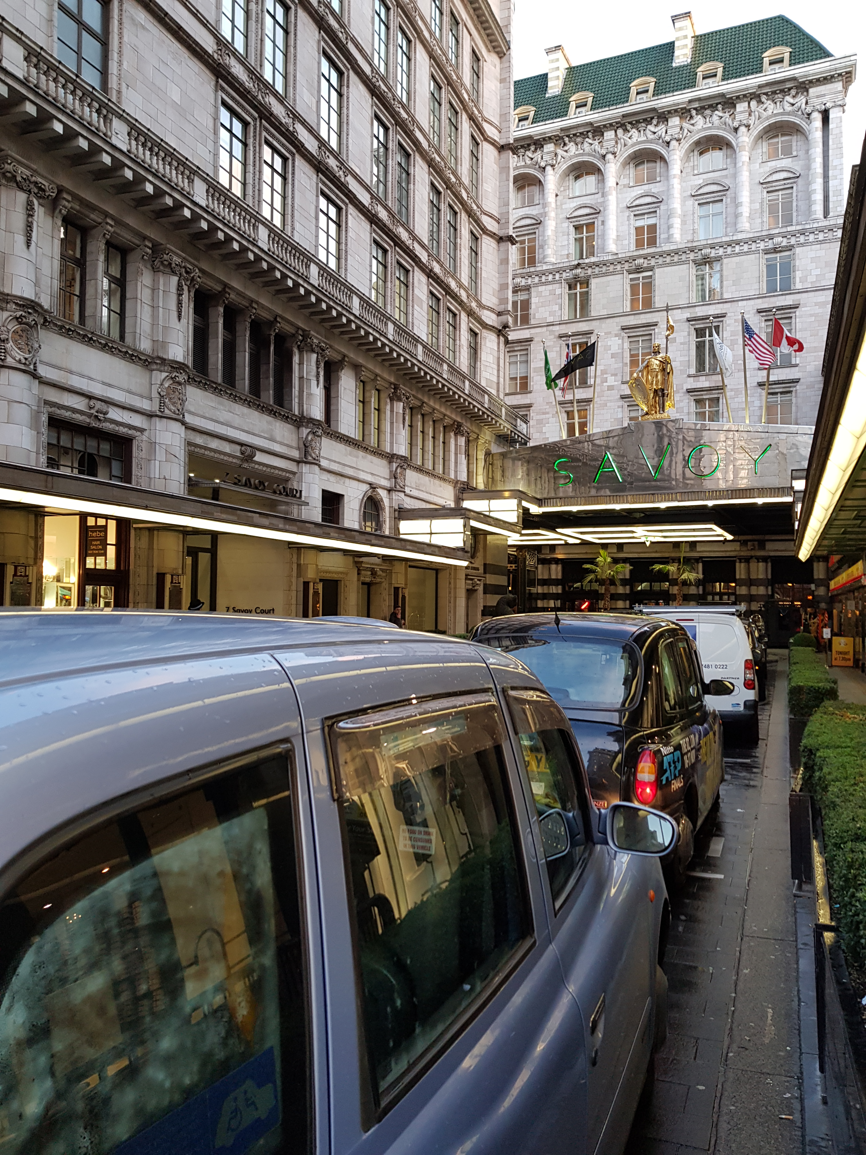 Hôtel Savoy, The Strand, Londres.